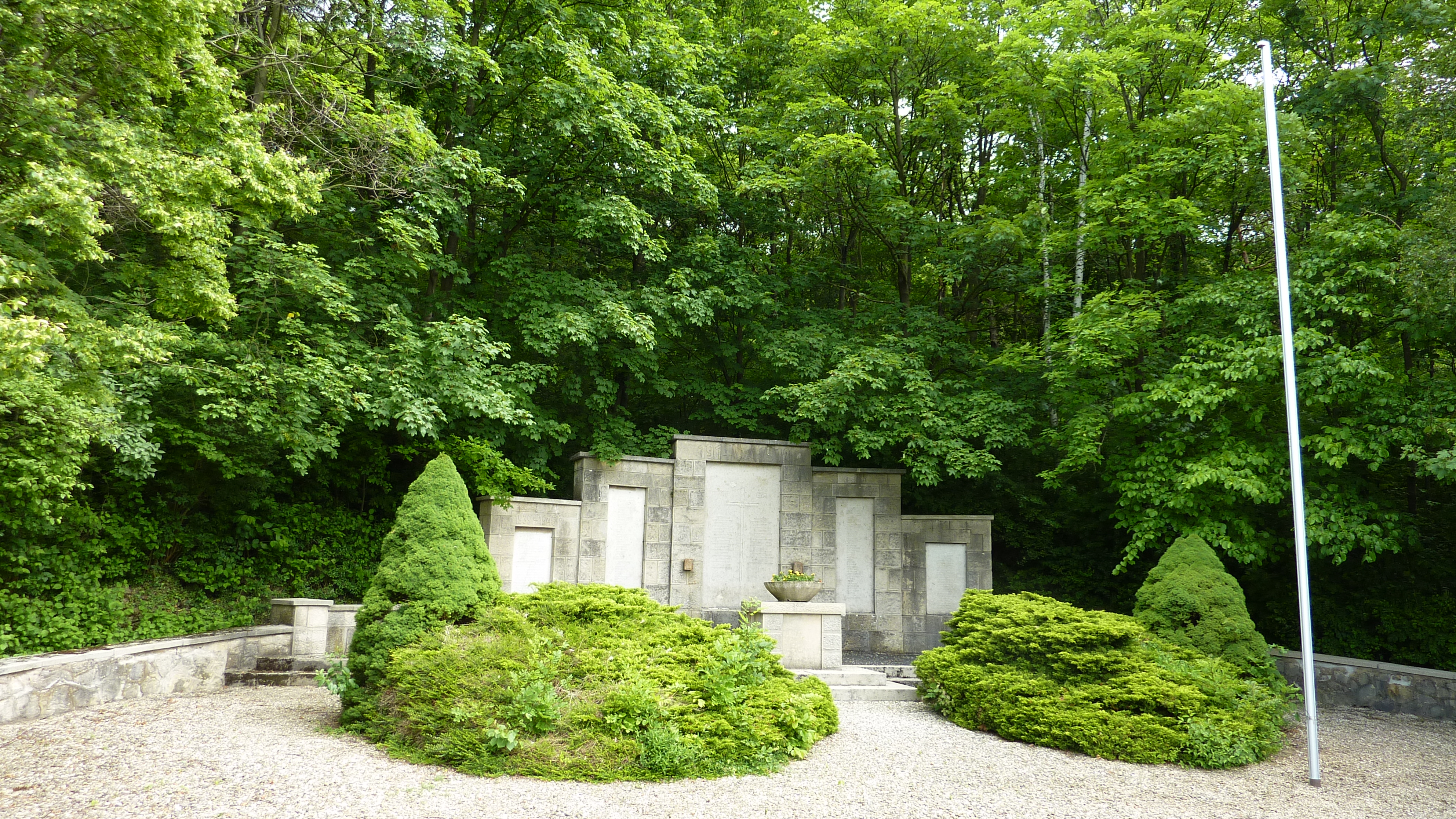 Deinsen Kriegsgräber